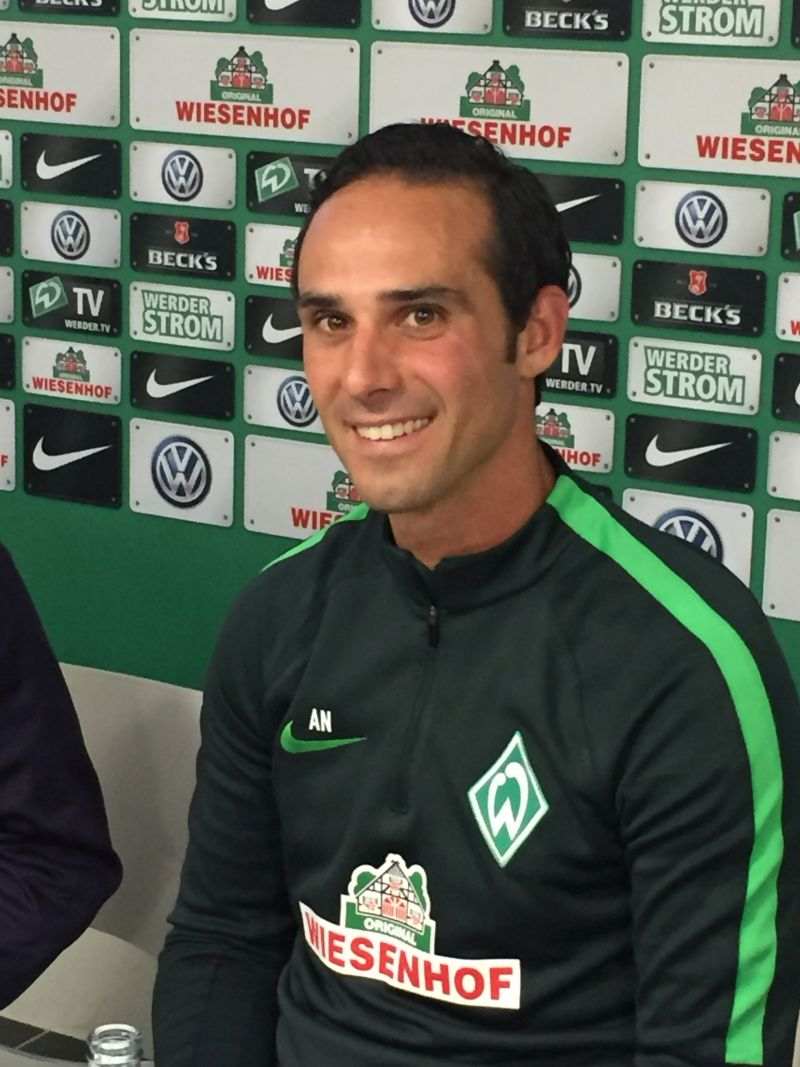 Alexander Nouri (Oktober 2016)